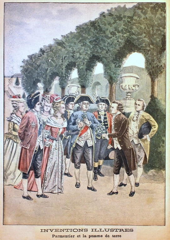 Louis XVI et Parmentier - Fleur de pomme de terre. Gravure en Petit Journal, mars 1901.